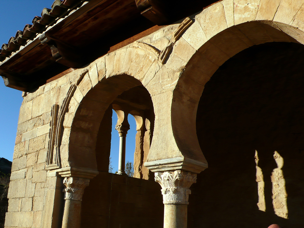 Detalle Monasterio de San Miguel de Escalada.